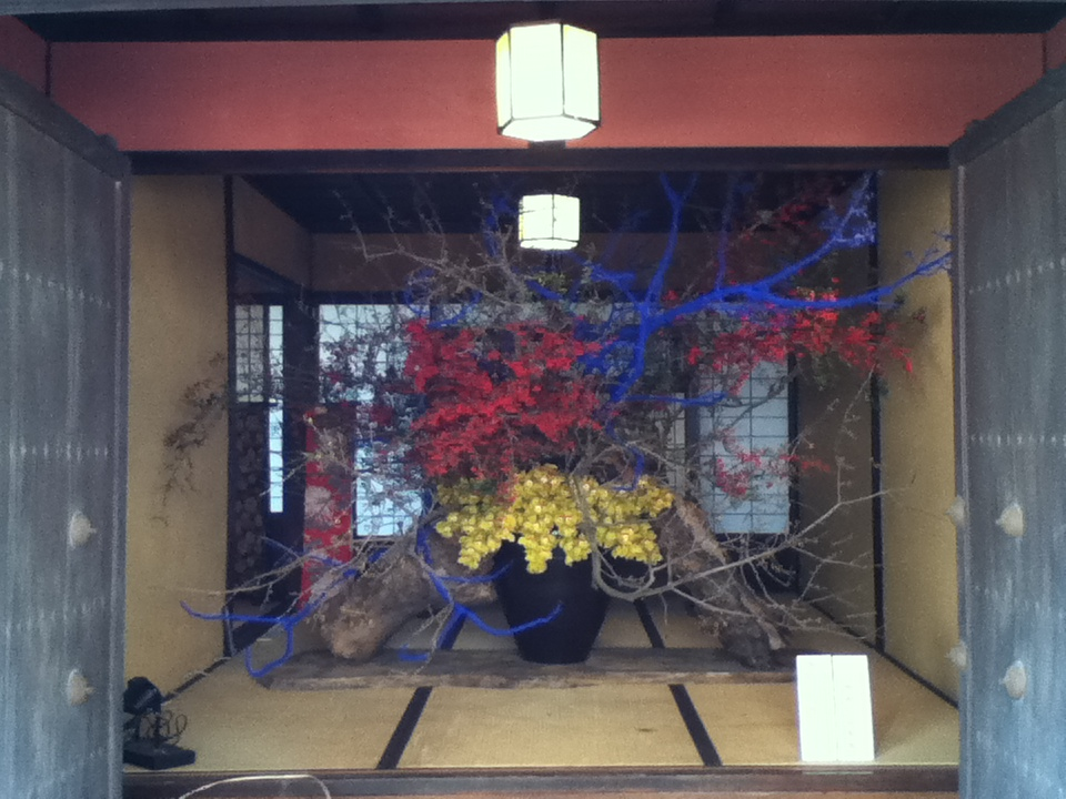 うだつをいける華道展